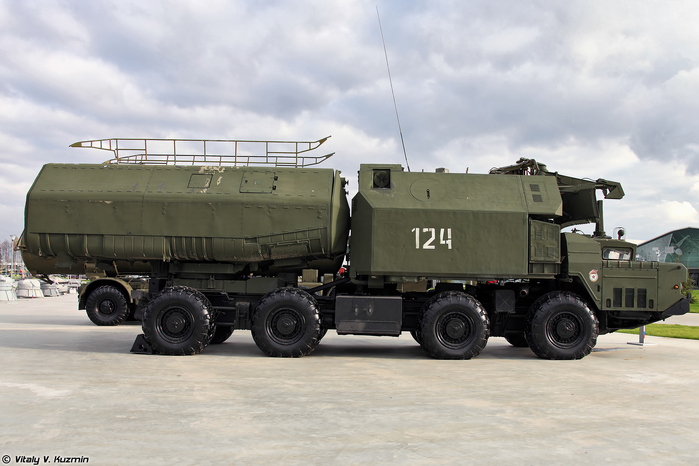 Самоходная пусковая установка 3С51 берегового ракетного комплекса 4К51 Рубеж